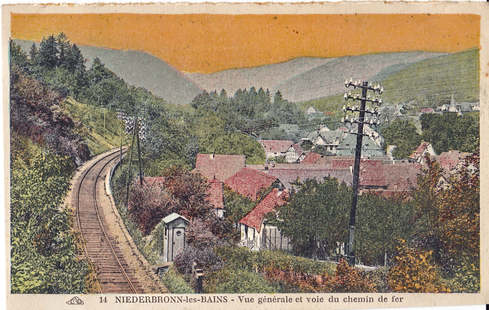 Carte postale ancienne éditée par CAP, n°14 :NIEDERBRONN-LES-BAINS - Vue générale et voie du chemin de fer